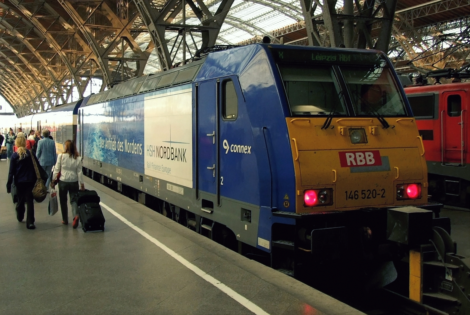 Veolia/Connex Baureihe 146 mit Zuglauf Leipzig - Berlin - Rostock - Warnemünde InterConnex. im Leipzig Hbf.